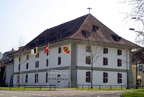 Kornhaus Burgdorf, Schweiz